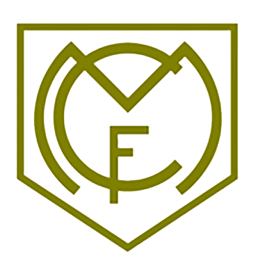 Emblema del Moderno Football Club de Madrid